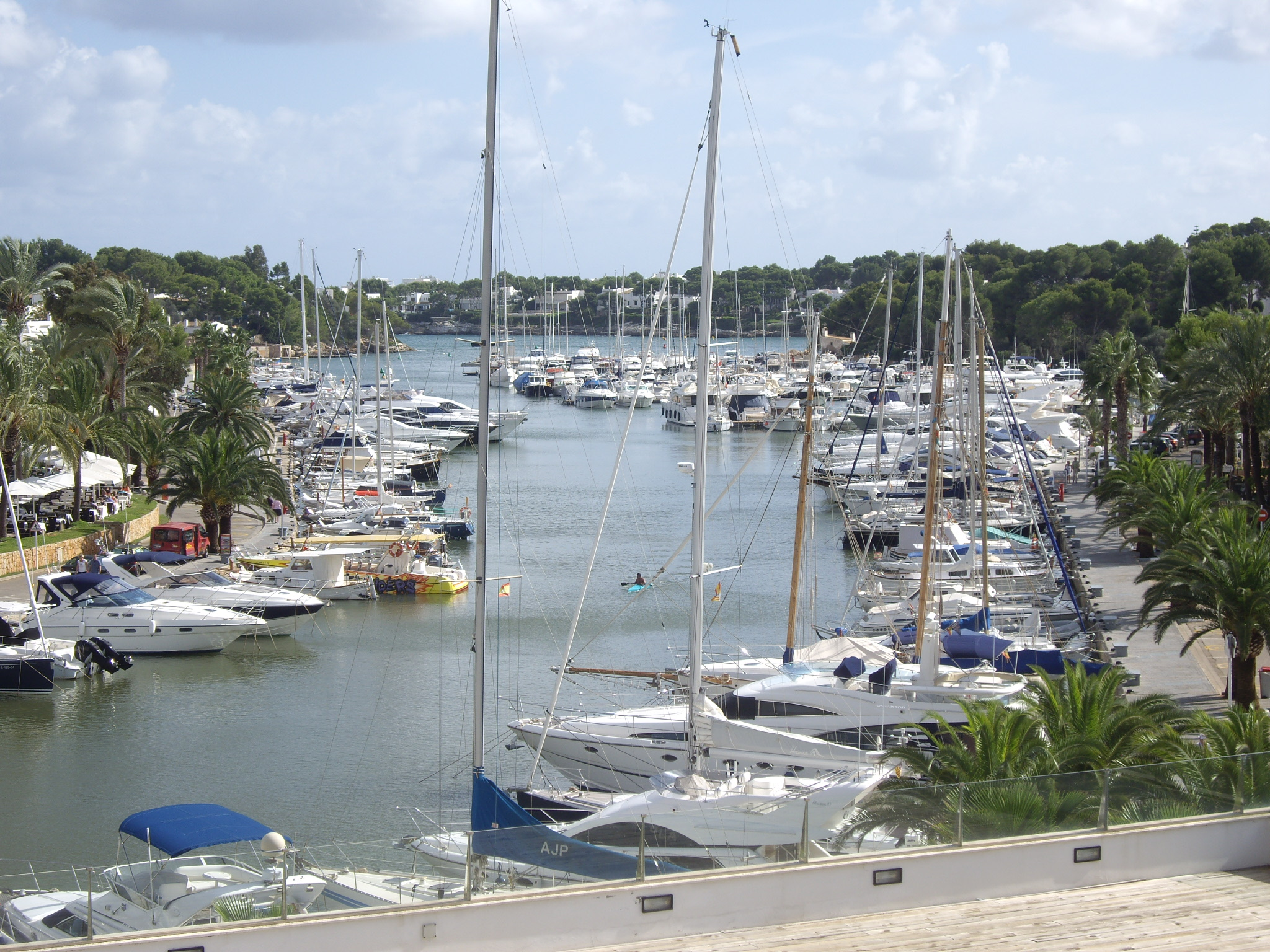 Vista de Cala Llonga